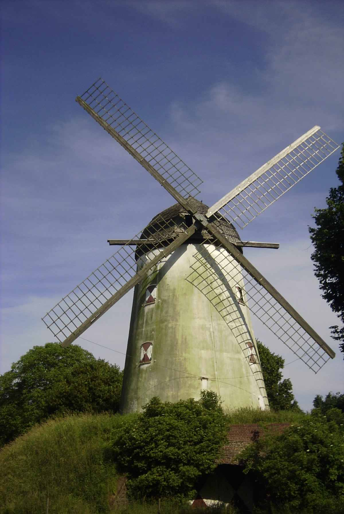 Bildbeschreibung: Turmwindmühle (Klapperwindmühle) bei Immerath, 1631 erbaut, bis 1936 stillgelegt. 1977/79 Flügel und Haube instand gesetzt. Quelle: eigenes Foto Fotograf/Zeichner: bodoklecksel 20:12, 25. Mär 2006 (CET) Datum: März 2006 Sonstiges: Die Mühle wird dem Tagebau Garzweiler weichen müssen.